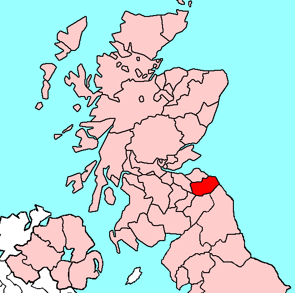 Berwickshire